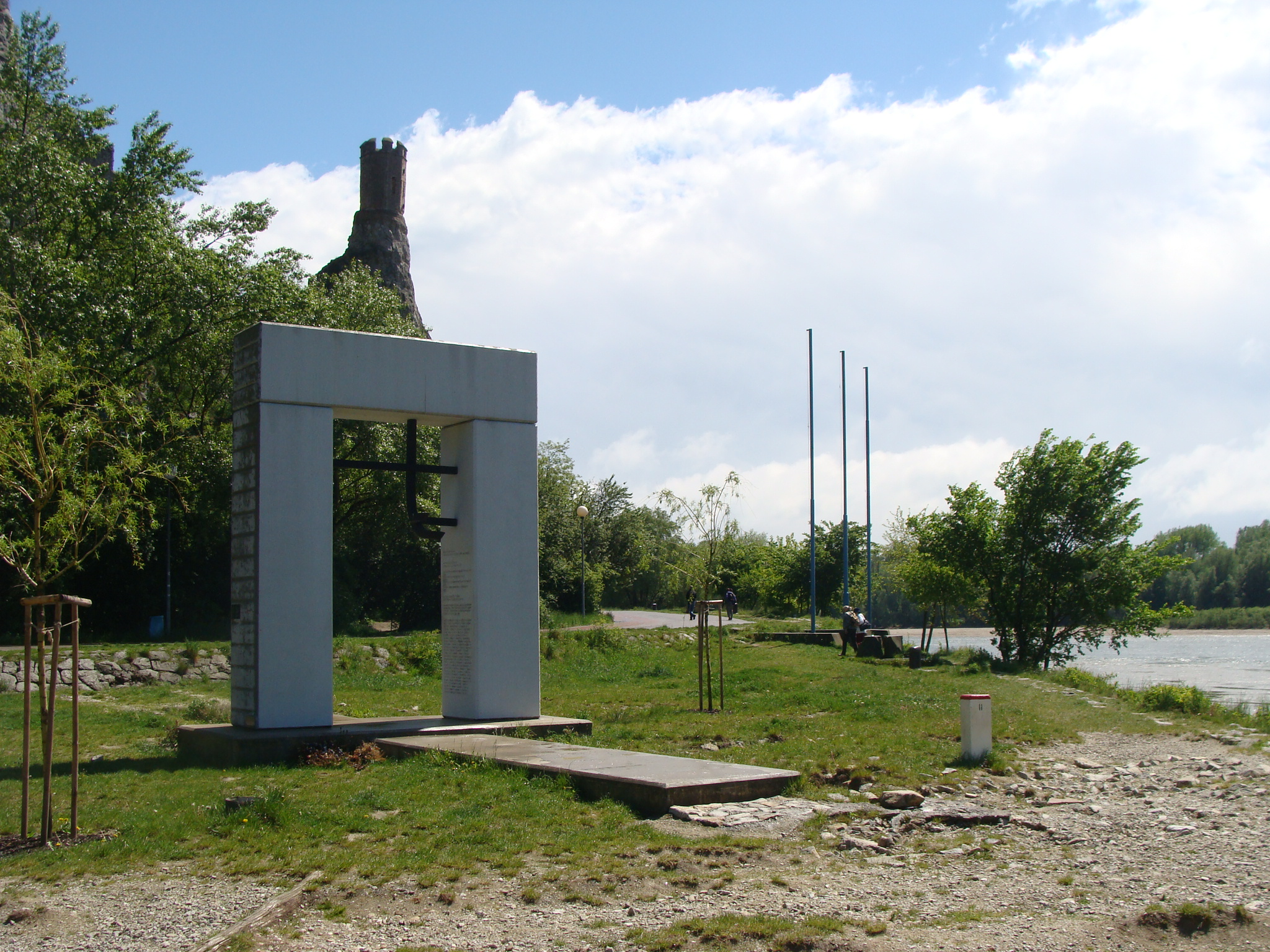 Mahnmal an die Grenztoten der ČSSR unterhalb der Burg Devín (Theben), Slowakei